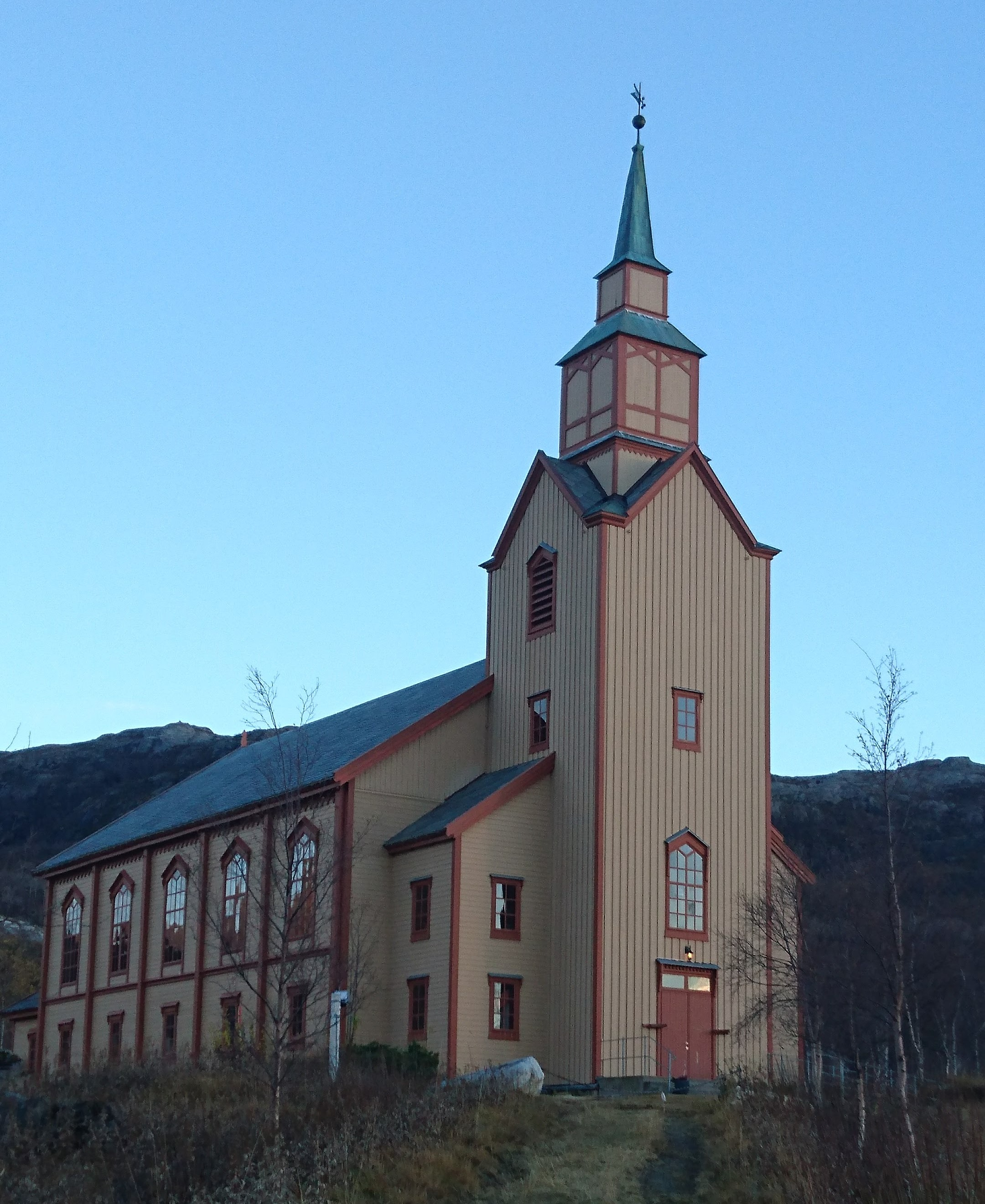 Gildeskål Hovedkirke, november 2016